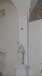 stlp